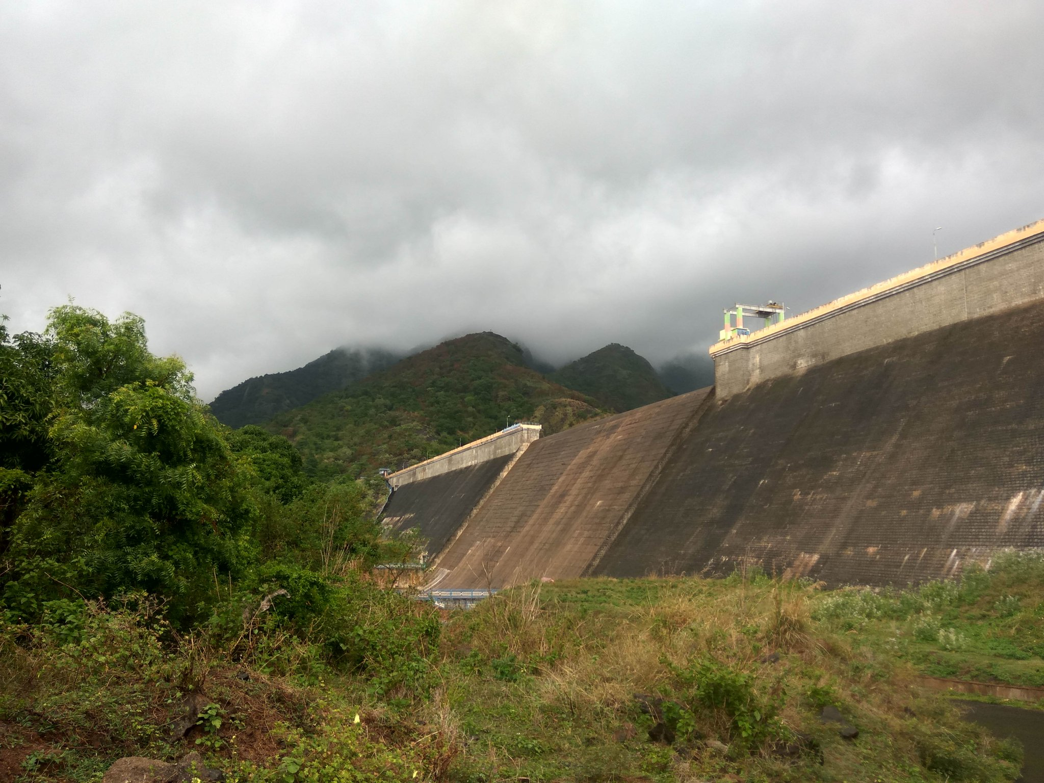 அடவிநயினார் அணைக்கட்டு1